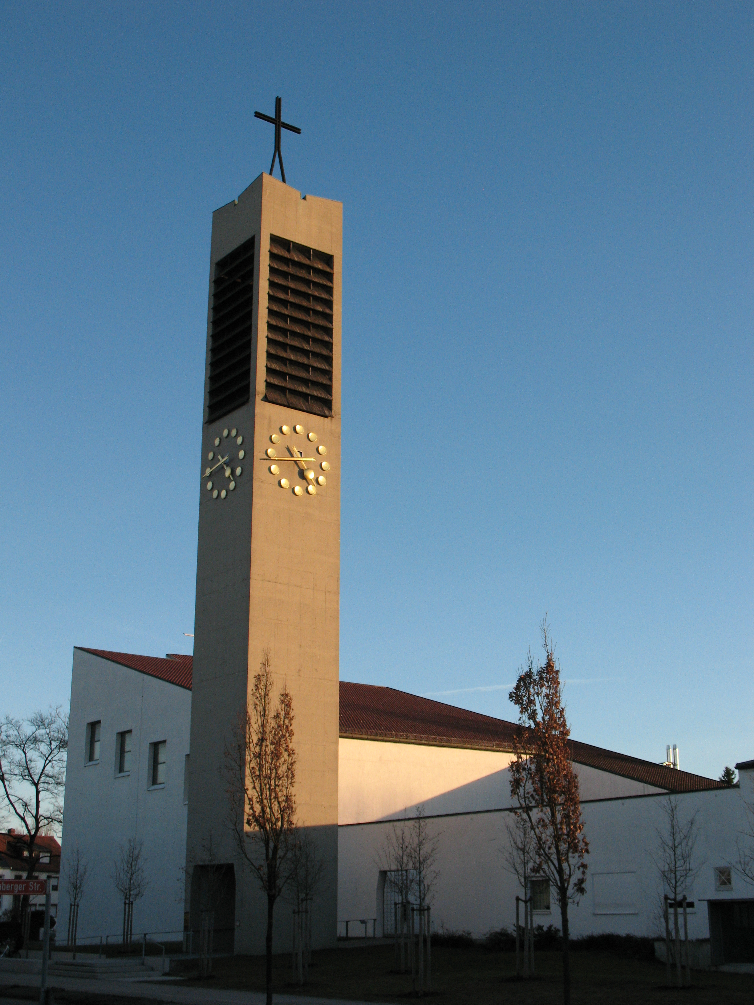 Die Pfarrkirche Heilig Kreuz Dachau.